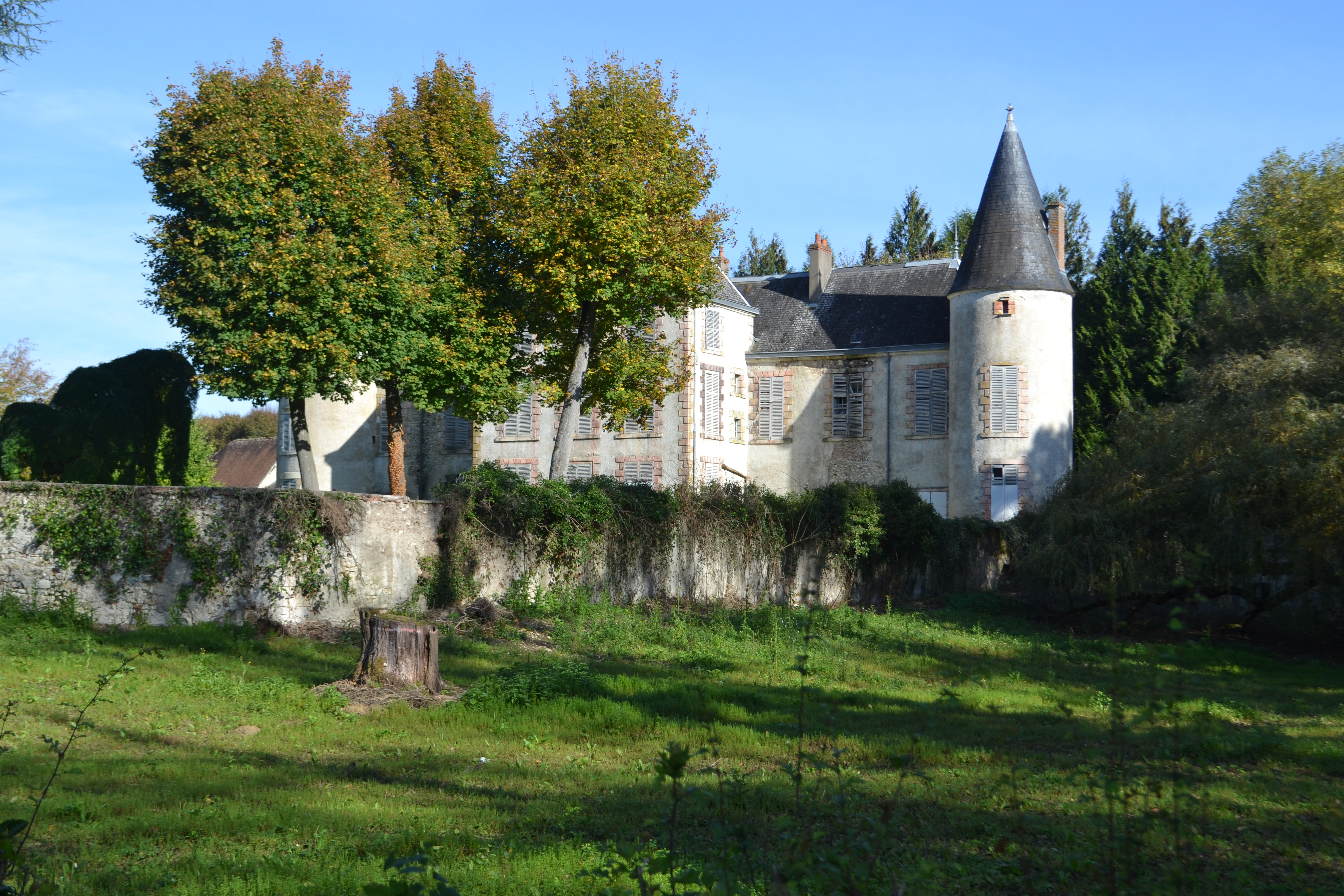 Le château de Myennes (Nièvre) en octobre 2014.